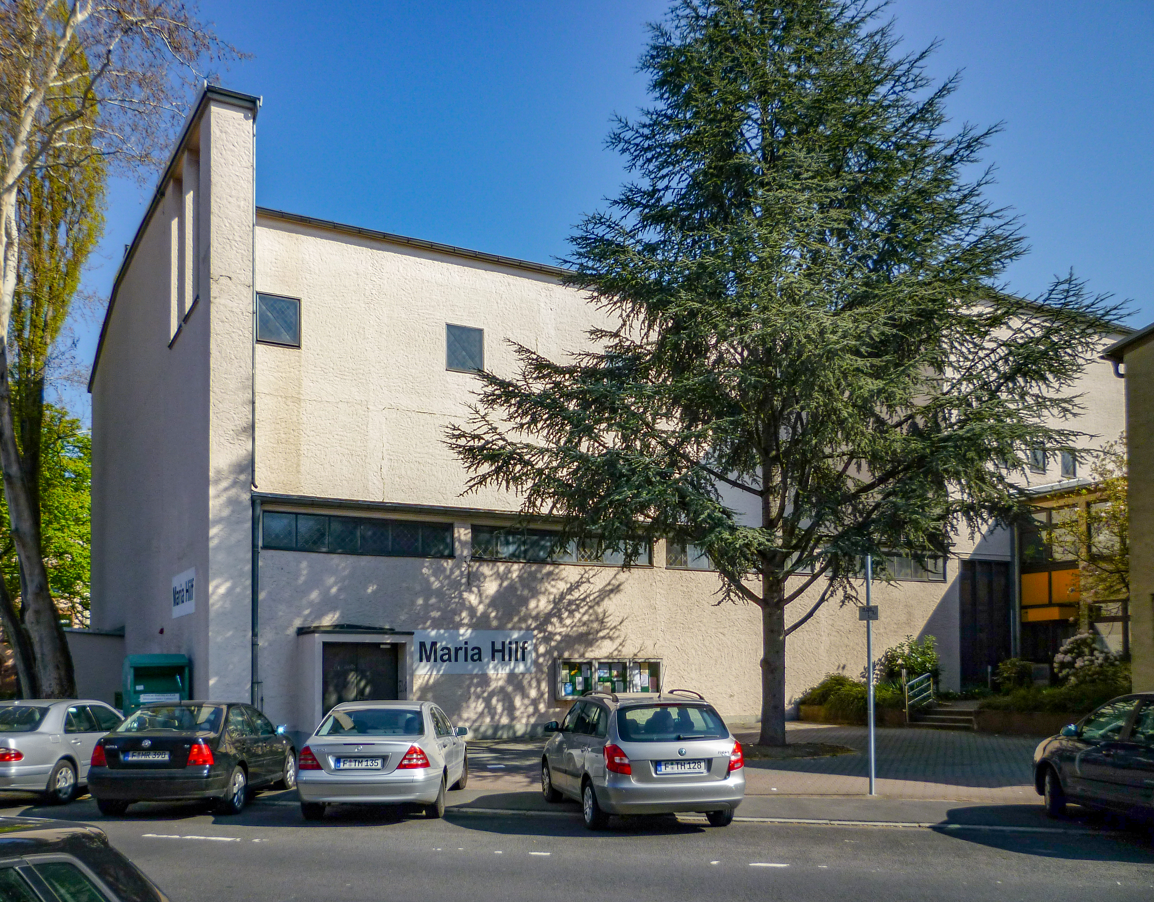 Kirche Maria Hilf, Frankfurt-Gallus, Blick von der Rebstöcker Straße